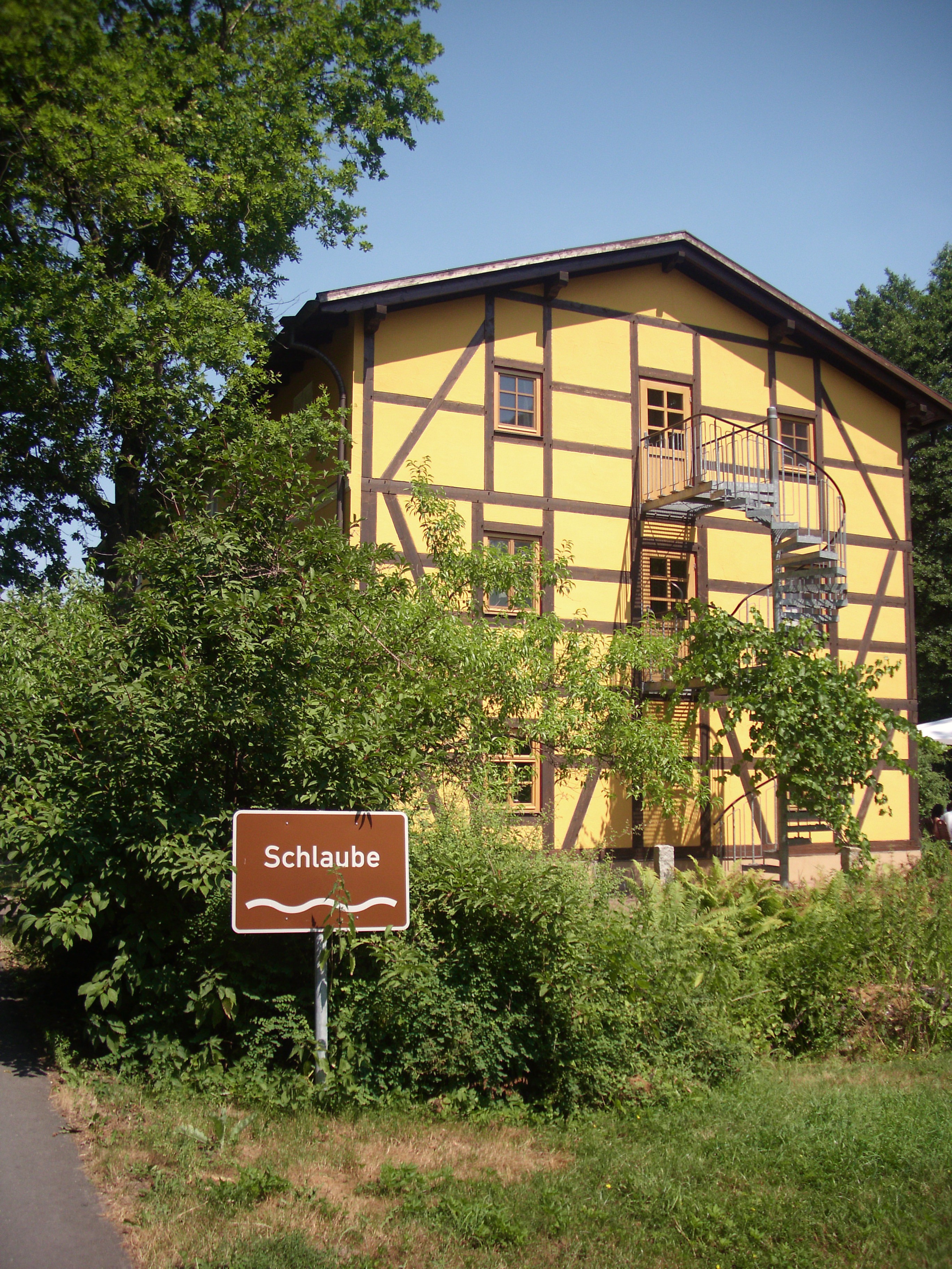 Hotel Kaisermühle, an der alten Schlaube, Kaisermühl bei Müllrose